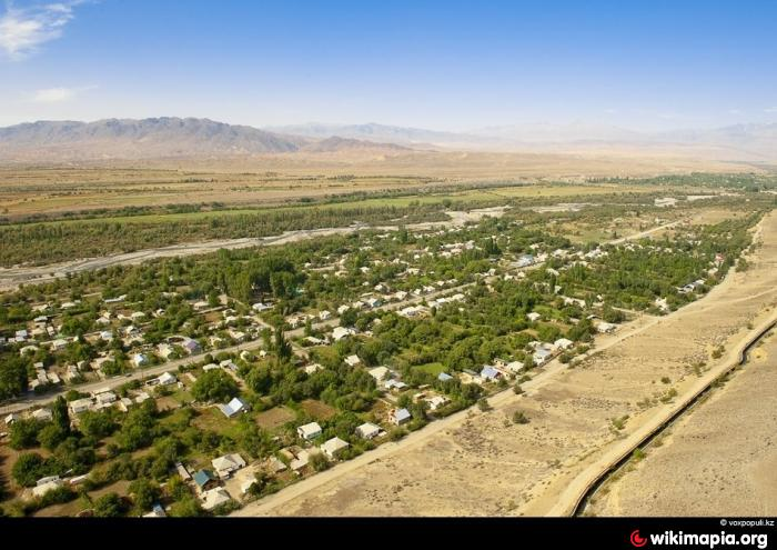 Село Лісновка Панфіловського району Алматинської області